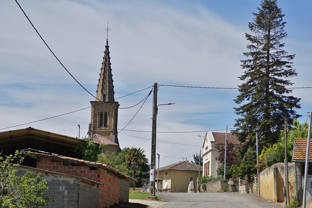 Haute Garonne